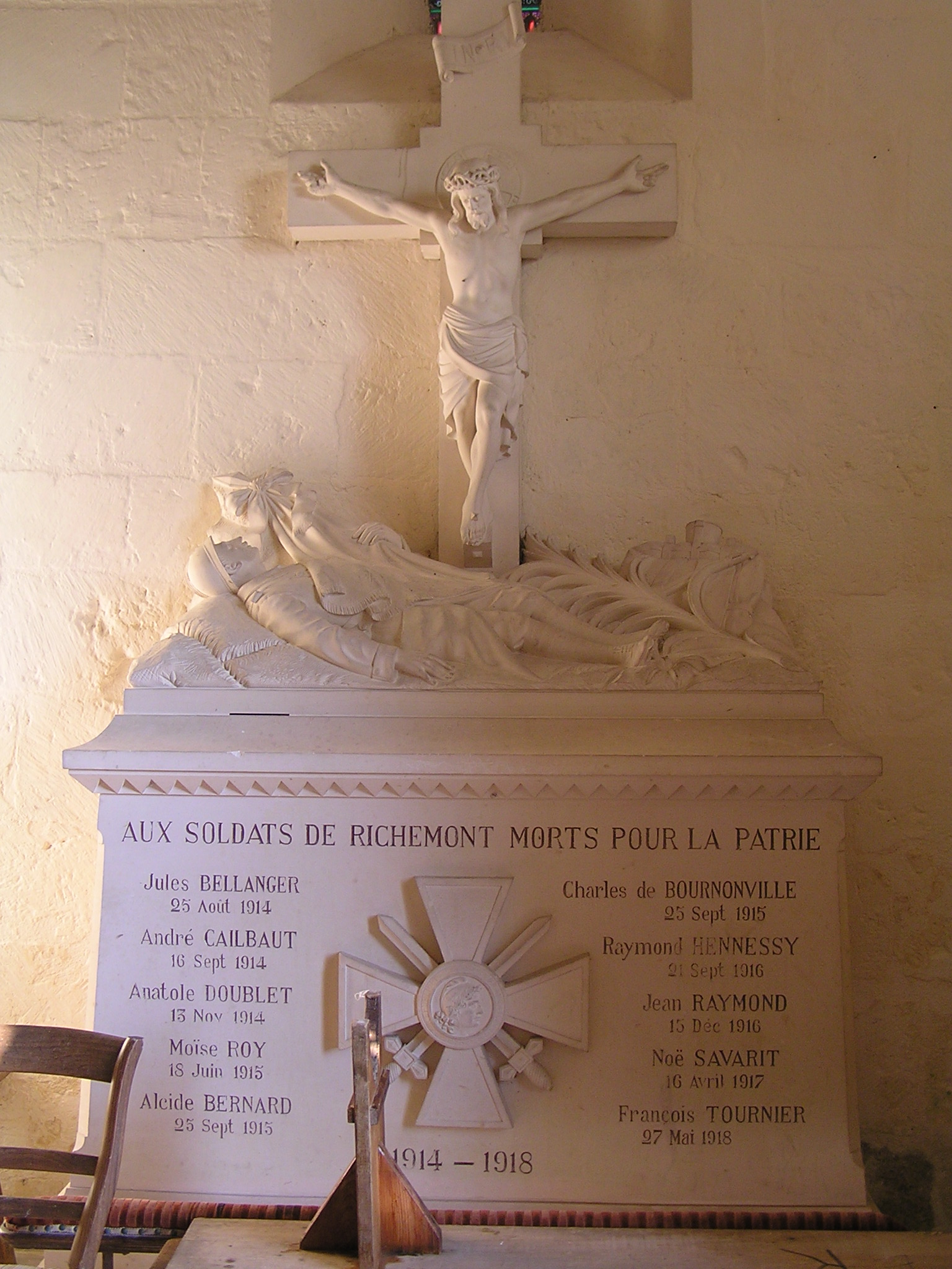 Cherves-Richemont (Charente) dans l'église Saint-Georges de Richemont, le monument aux morts